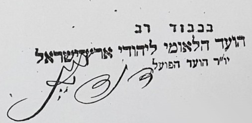 חתימתו של דוד ילין כראש הועד על מכתב ששלח ב-21.5.1922 ל״הדסה״ על מנת שישלחו תרופות למלריה לתושבי המושבה מזכרת בתיה